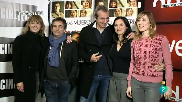 Fotografía de los ganadores de los Premios Días de Cine